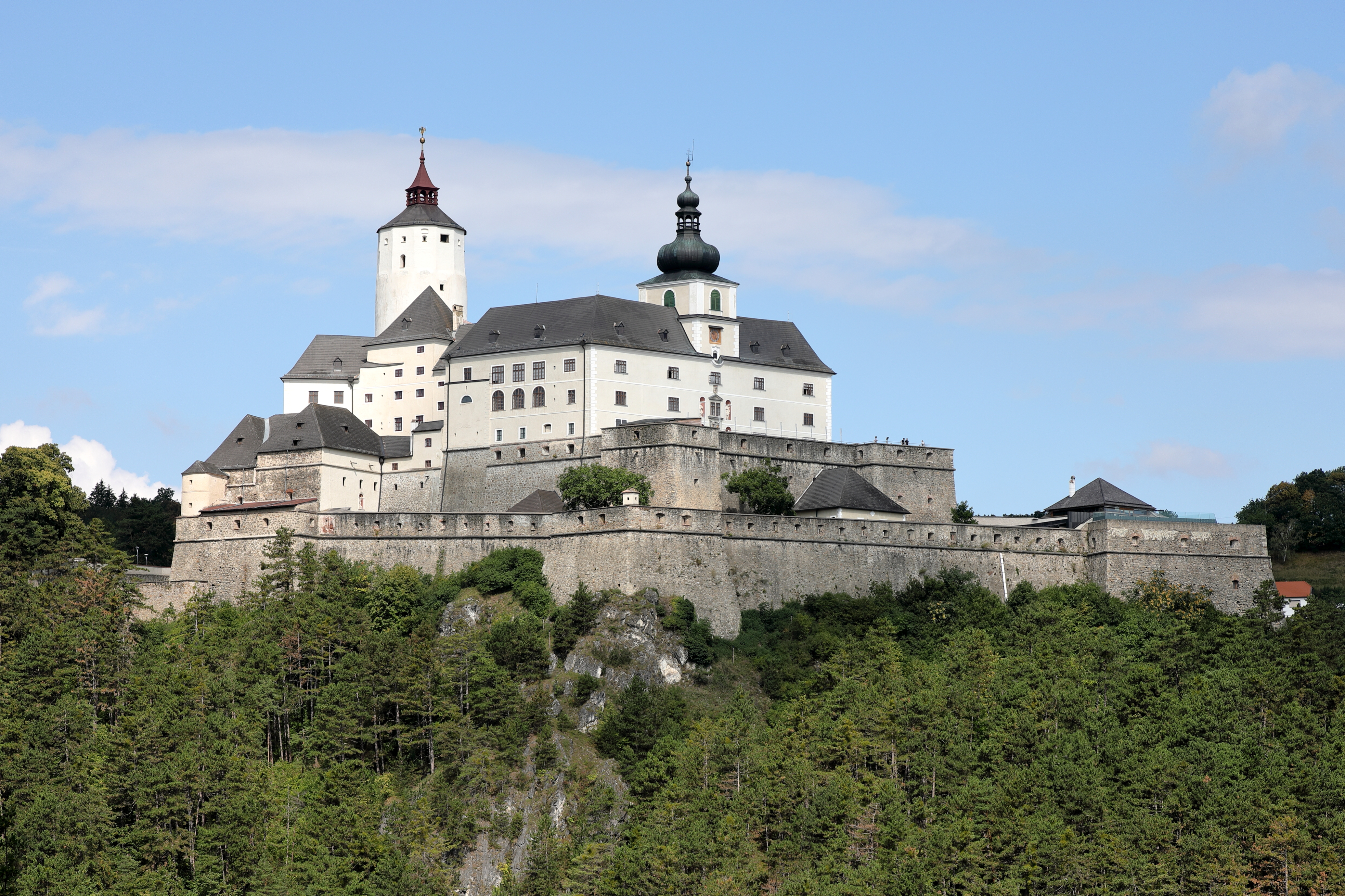 Südostansicht der Burg Forchtenstein in Neustift an der Rosalia, ein Ortsteil der burgenländischen Gemeinde Forchtenstein.Die Burg befindet sich auf einem steilen Dolomitfelsen am Ostabhang des Rosaliengebirges und sicherte die Straßenverbindung Wr. Neustadt - Ödenburg (heutiges Sopron). Sie wurde ab dem 14. Jahrhundert von den Grafen von Mattersdorf errichtet. Nachdem die Burg 1626 in den Besitz der Esterházy gelangte, wurde sie im 17. Jahrhundert umfangreich um- und ausgebaut.